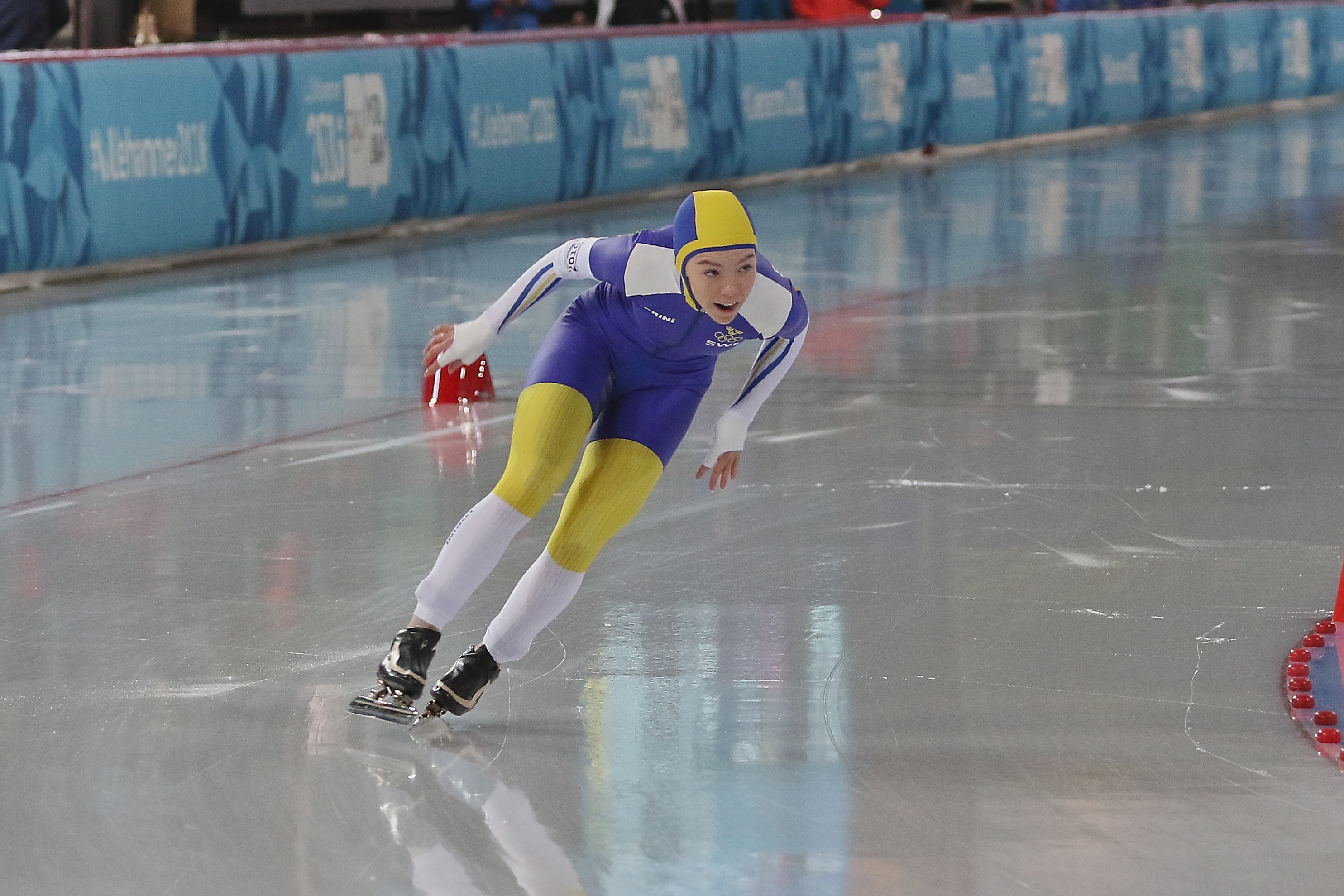 Lillehammer 2016 - Speed skating Ladies' 500m race 1 - Erika Lindgren